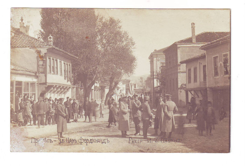 Български военни в Прилеп, 1916 година